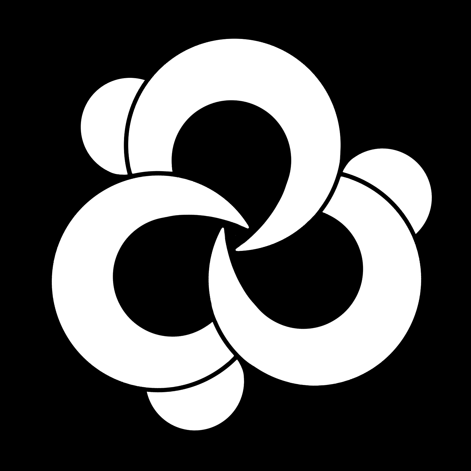 「三ツ猿」紋（染抜）